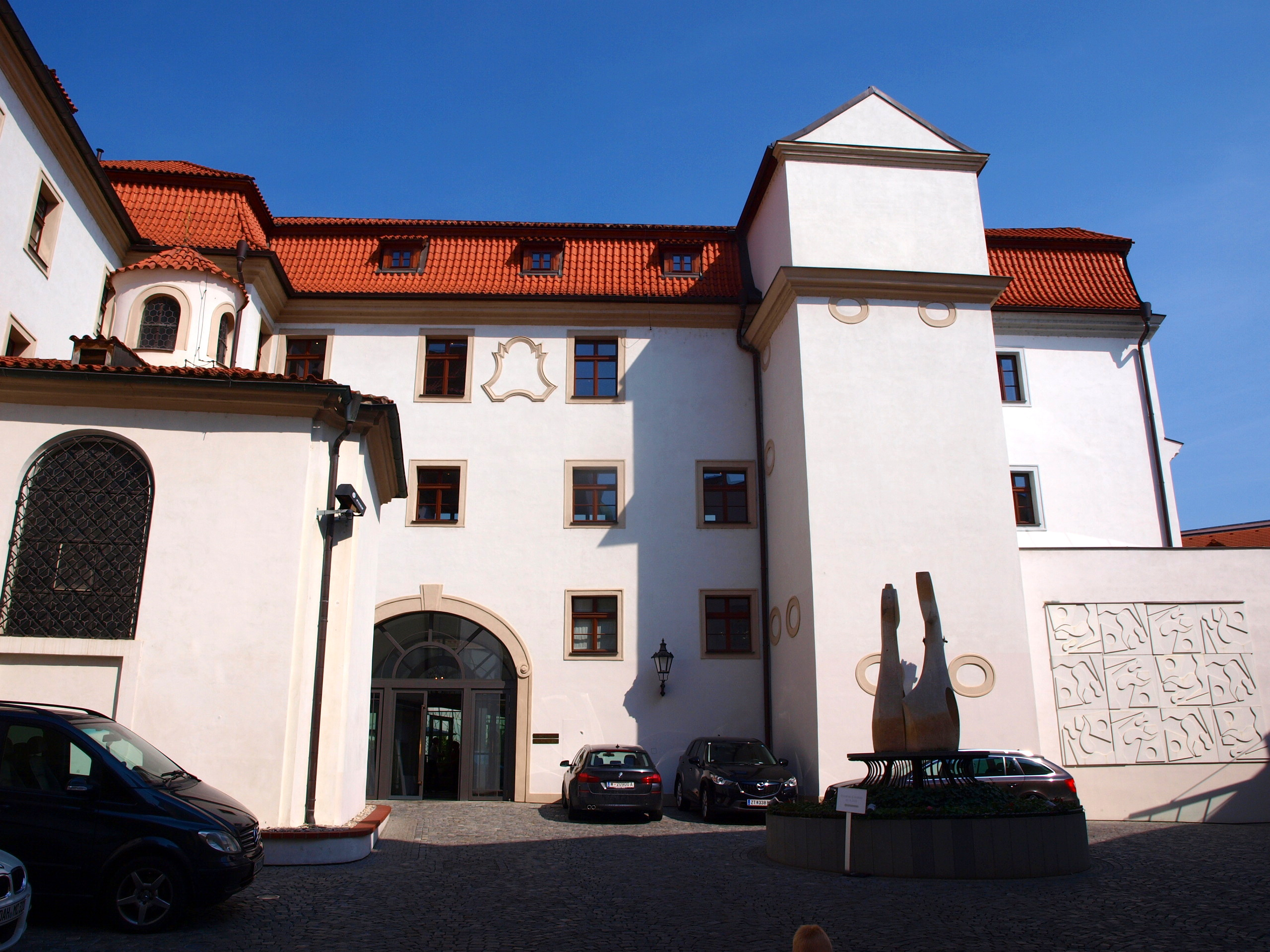 Praha-Malá Strana, kostel sv. Tomáše a Augustiniánský klášter